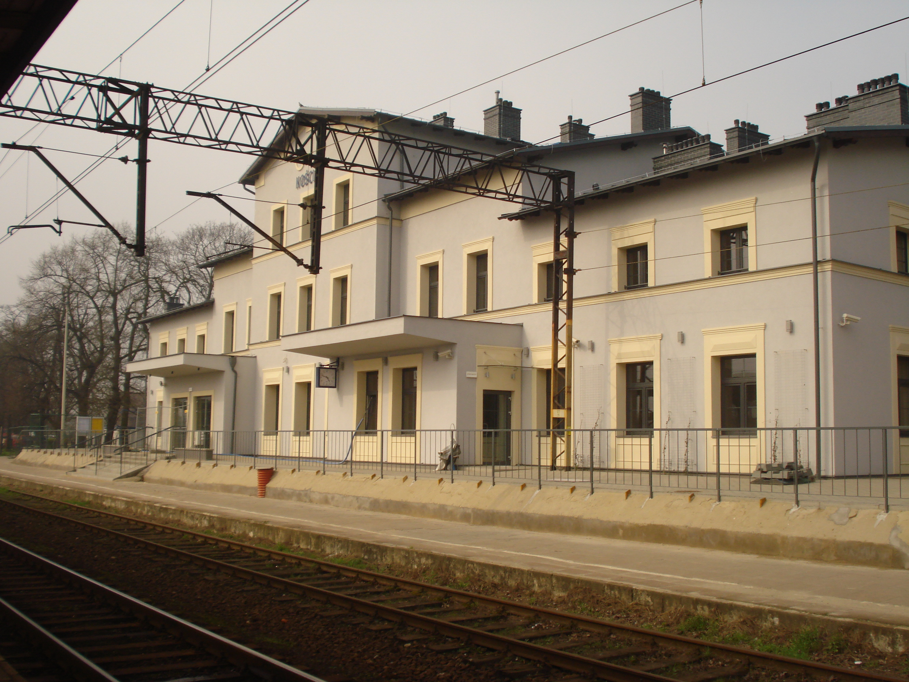 Dworzec PKP W Kościanie po modernizacji